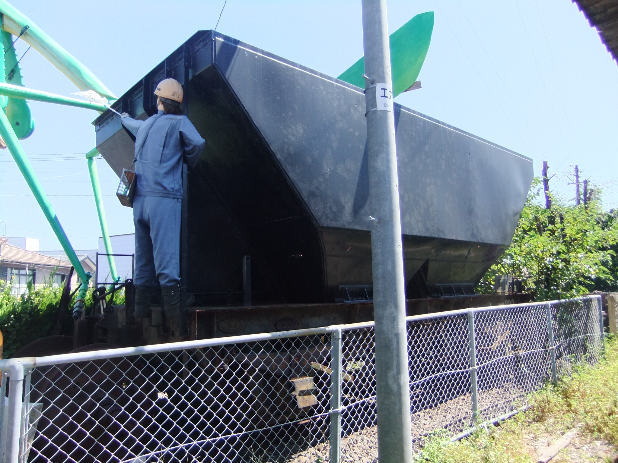 たびら平戸口駅に保存されているセラ2206